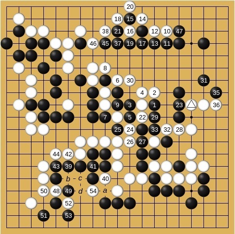 101-154手 154手完白中押し勝ち